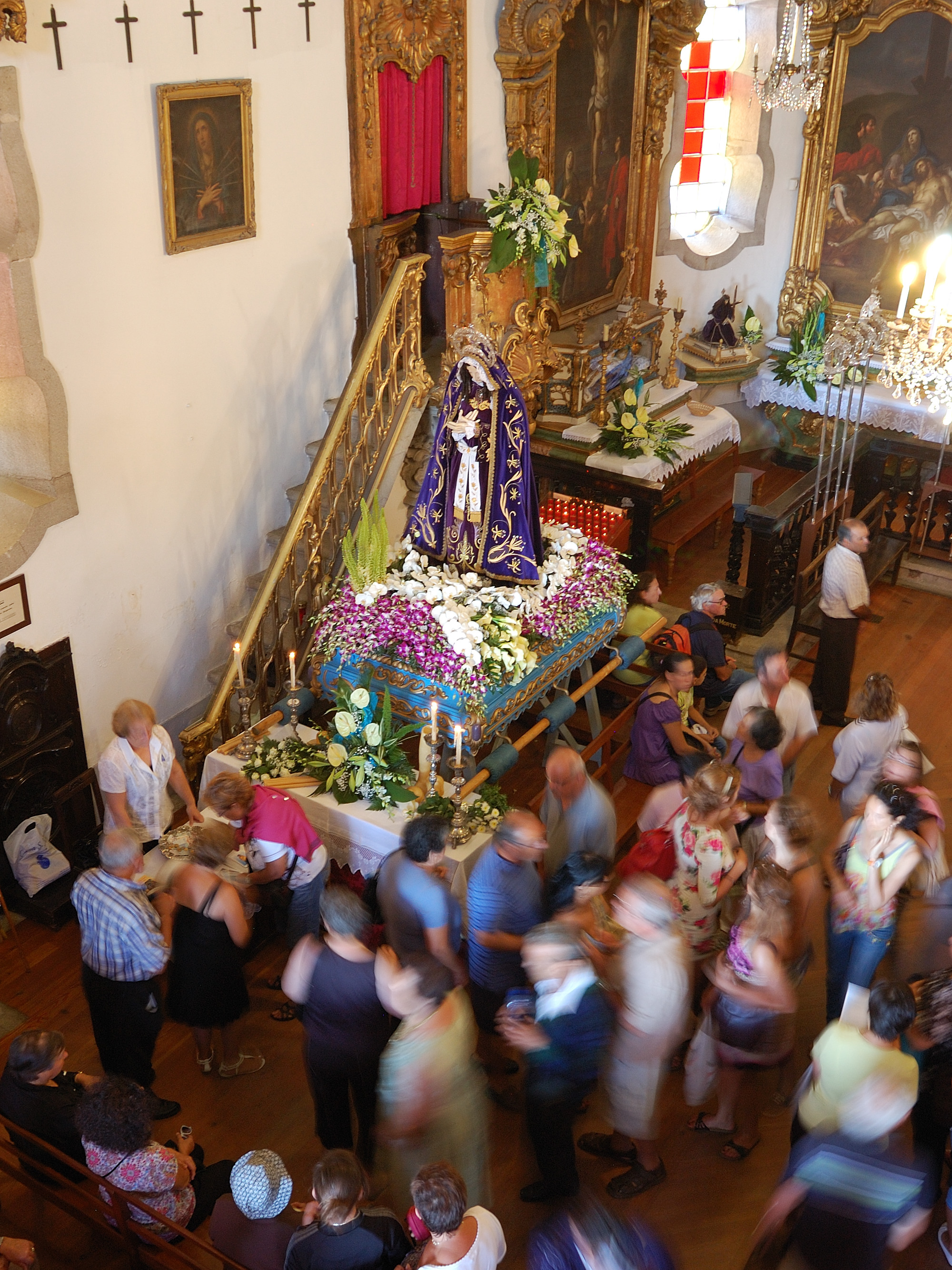 Viana do Castelo, Portugal [2010]